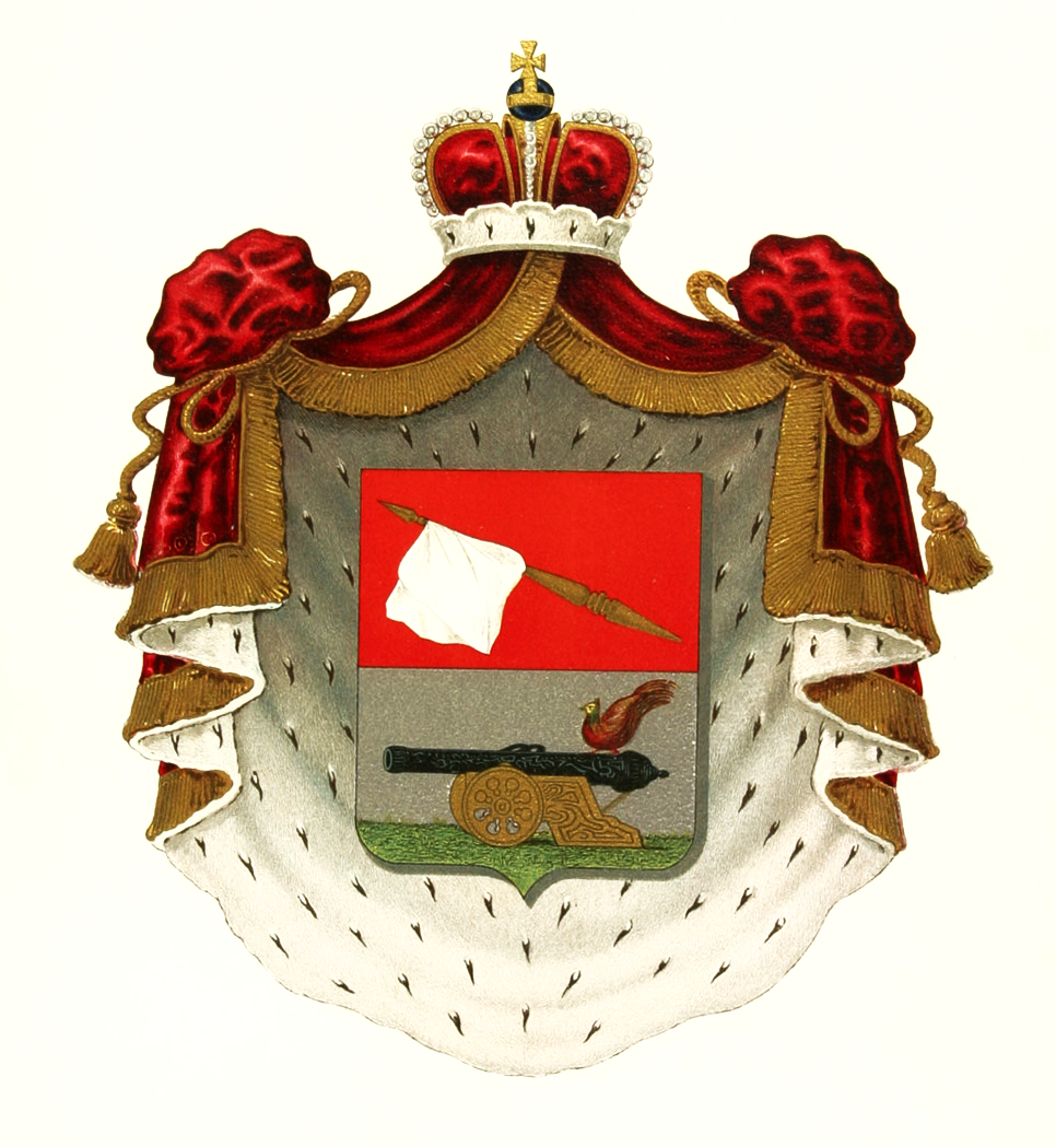 Герб рода Татищевых